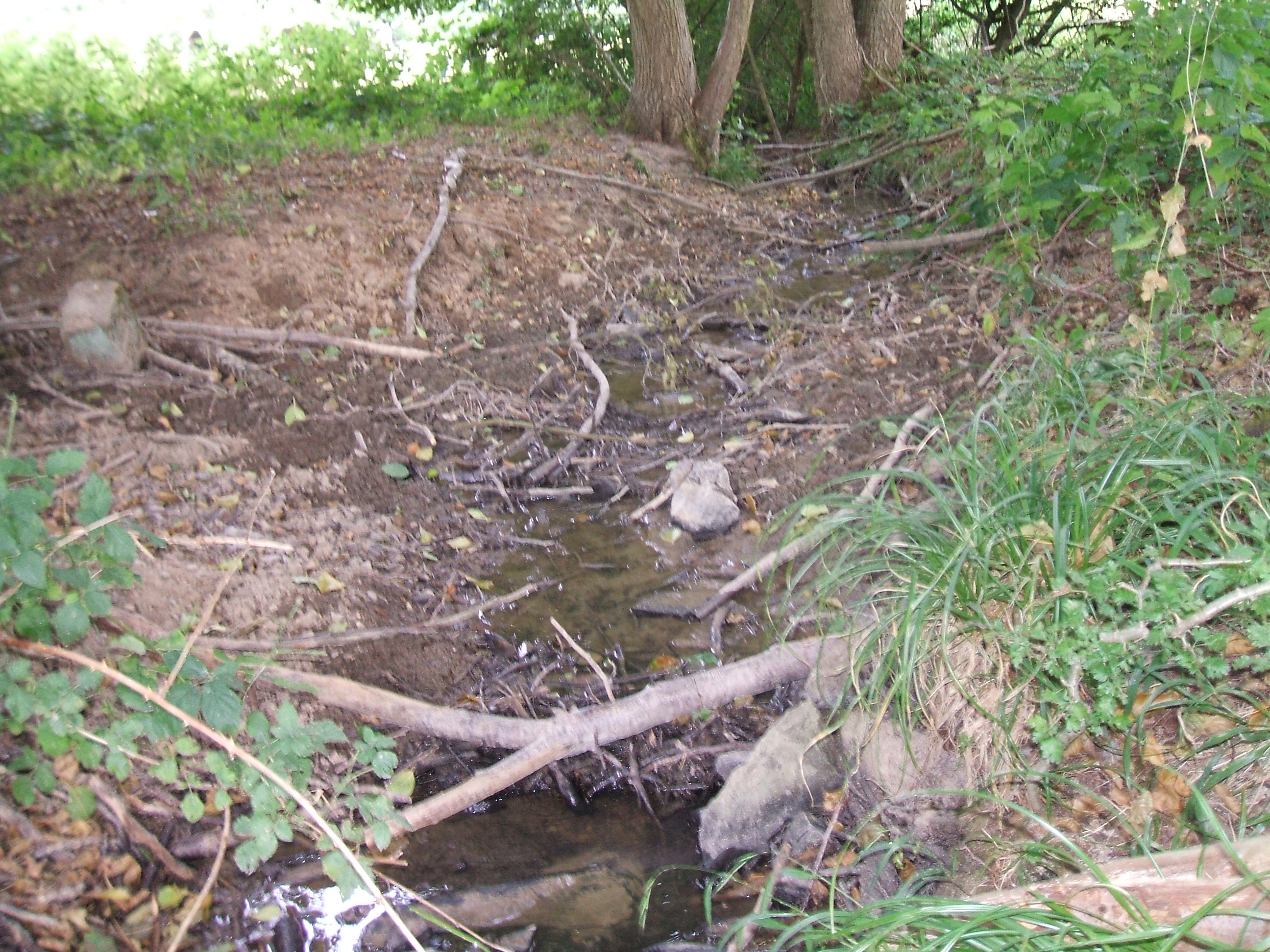 Nach Wochen langer Trockenheit führt auf etwa 277 m Höhe der von links (Westen) kommende Fauerbach (vor dem Grenzstein) kein Wasser mehr, dafür die von Norden bis Nordwesten kommende Issel